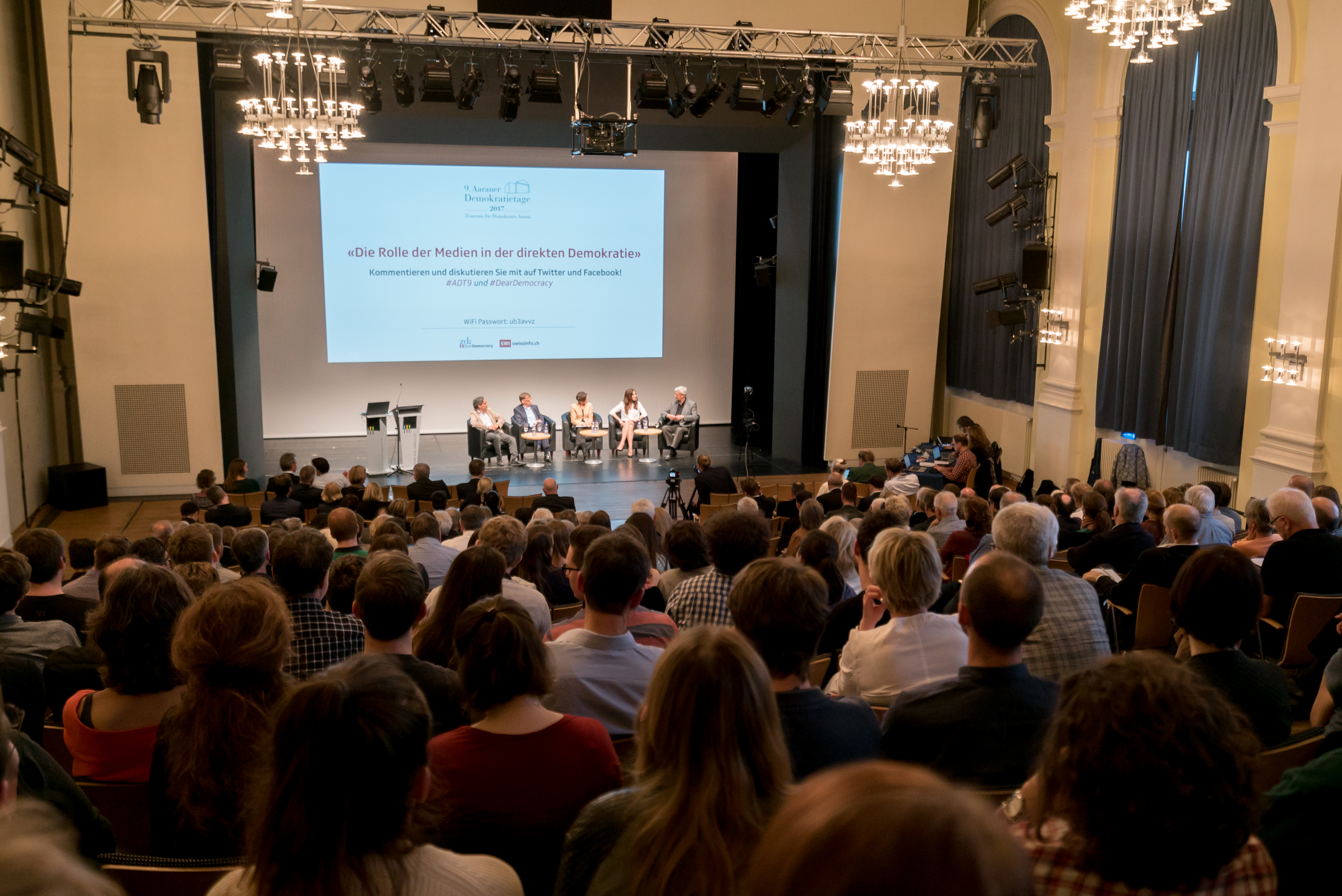 9. Aarauer Demokratietage 2017: Die Rolle der Medien in der direkten Demokratie. Foto: Basler